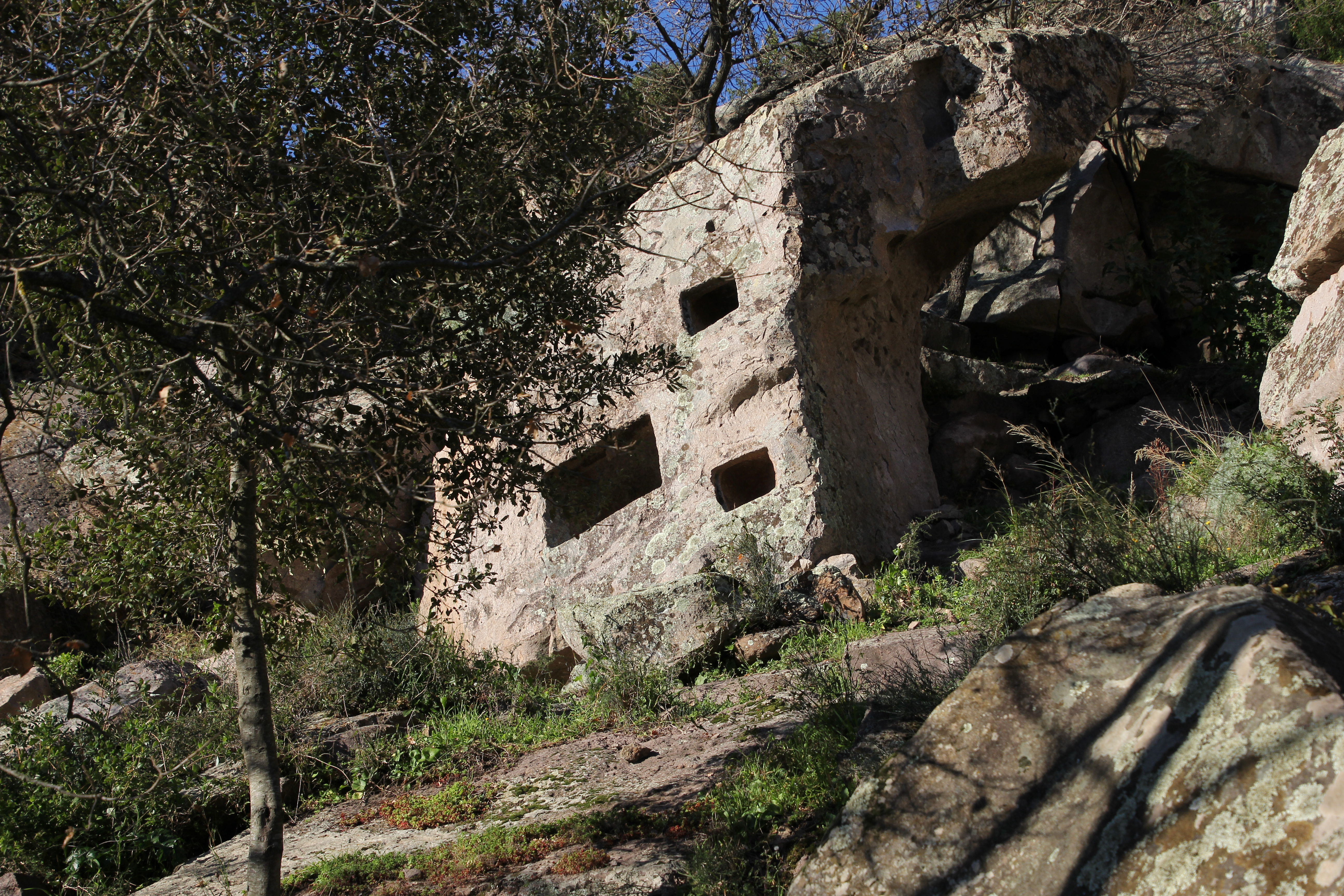 Sorradile, necropoli di Prunittu